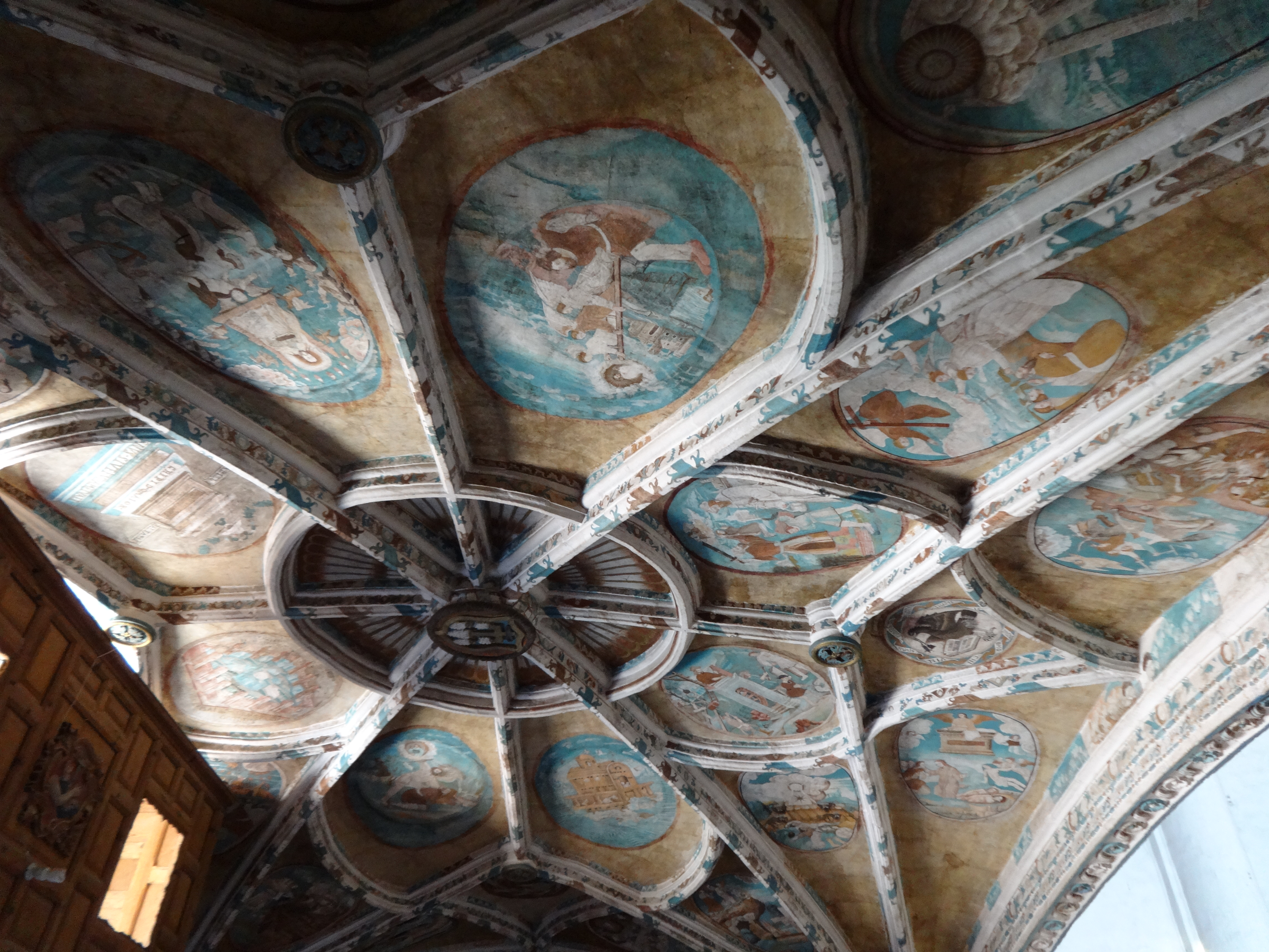 Medallones en la bóveda nervada del sotocorro.